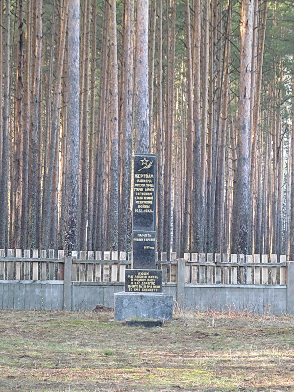 Старыя Дарогі